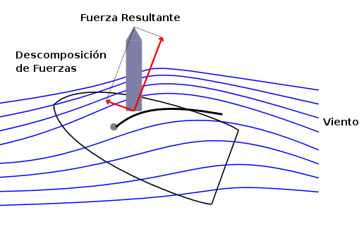 Gráfico esquemático de la acción del viento sobre la vela de un velero en ceñida.